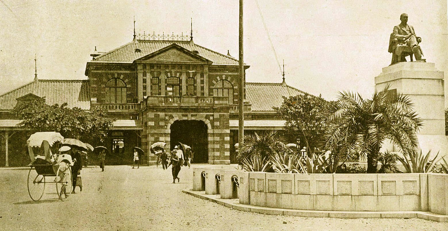 Der Bahnhof der Taiwanesischen Hauptstadt Taipeh im Jahr 1914.中文（台灣）: 出現在1914台灣寫真帖中的日本時代初期台北火車站老照片，位置大約在現代台北車站地面站體的西側正對館前路的地方。